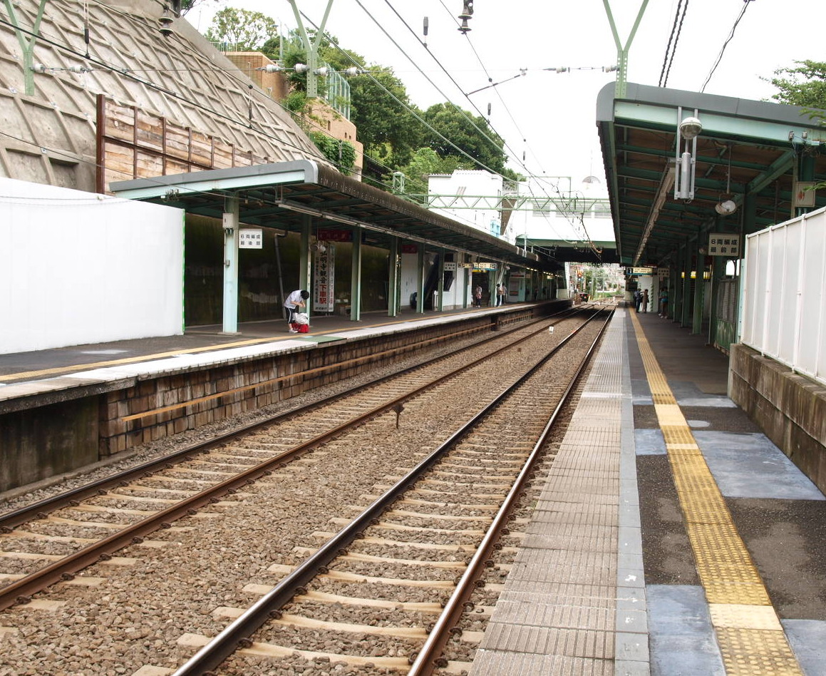 京急弘明寺駅 プラットホーム